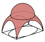 Schematische Darstellung Penditifkuppel. Eigene Zeichnung. Public Domain